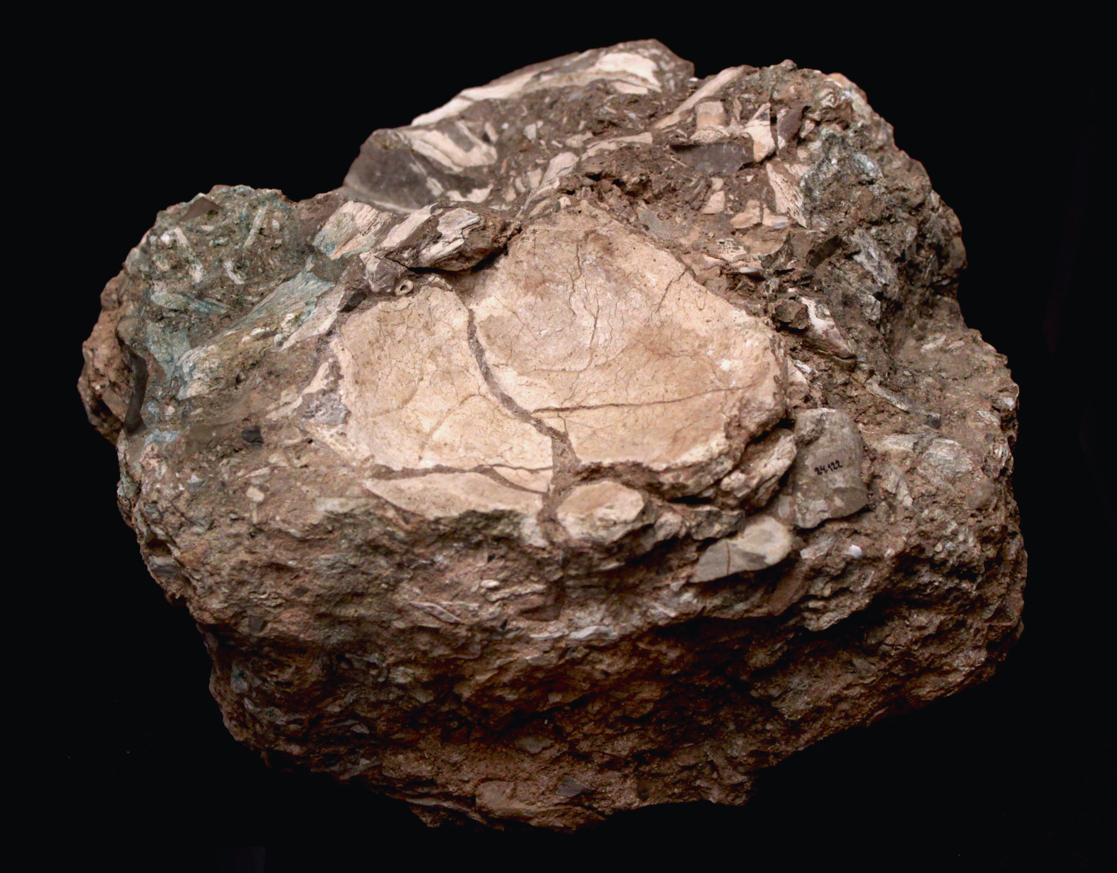 Parietal neandertal (Homo neanderthalensis) incluído en una brecha osífera de la Cova del Balomor de Tavernes de la Valldigna datada en 130.000 años (nivel VI de la cueva). Fondos del Museo de Prehistoria de Valencia, Comunidad valenciana, España.